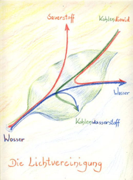 Die Lichtvereinigung, Lehrstück Faradays Kerze, Susanne Wildhirt